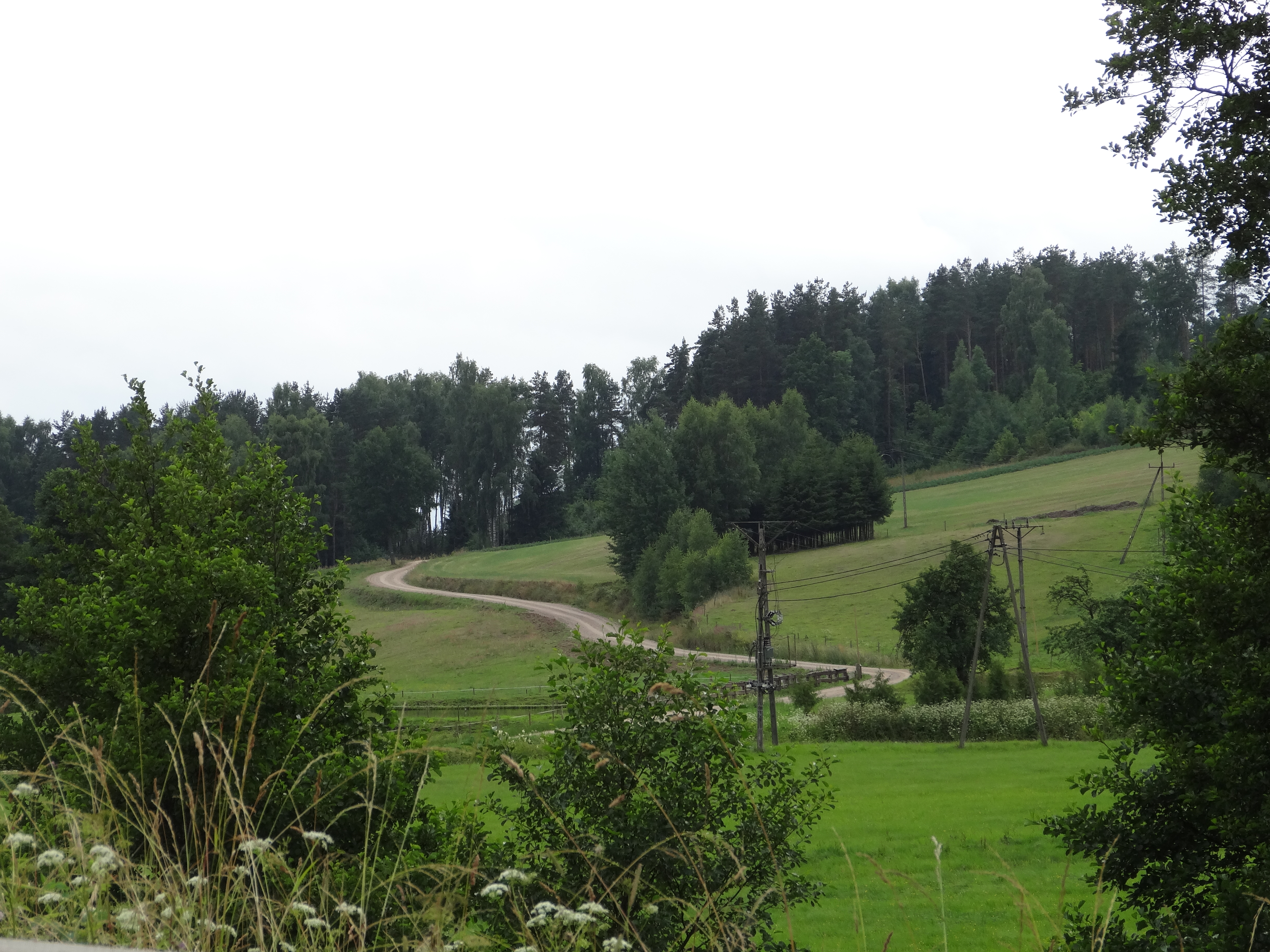 Ścieżka wokół jeziora Jaczno, dróżki w plątaninie kabli...